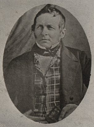 Louis Méthot